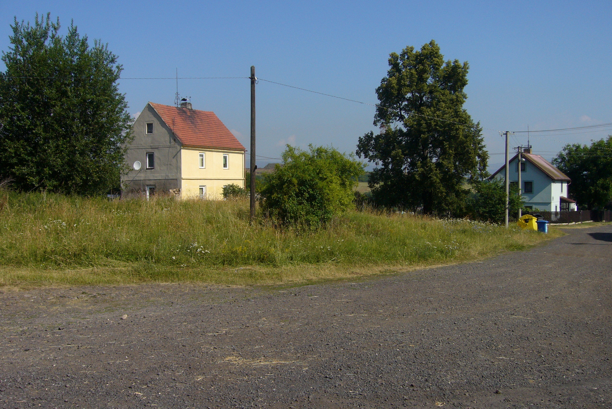 Náves